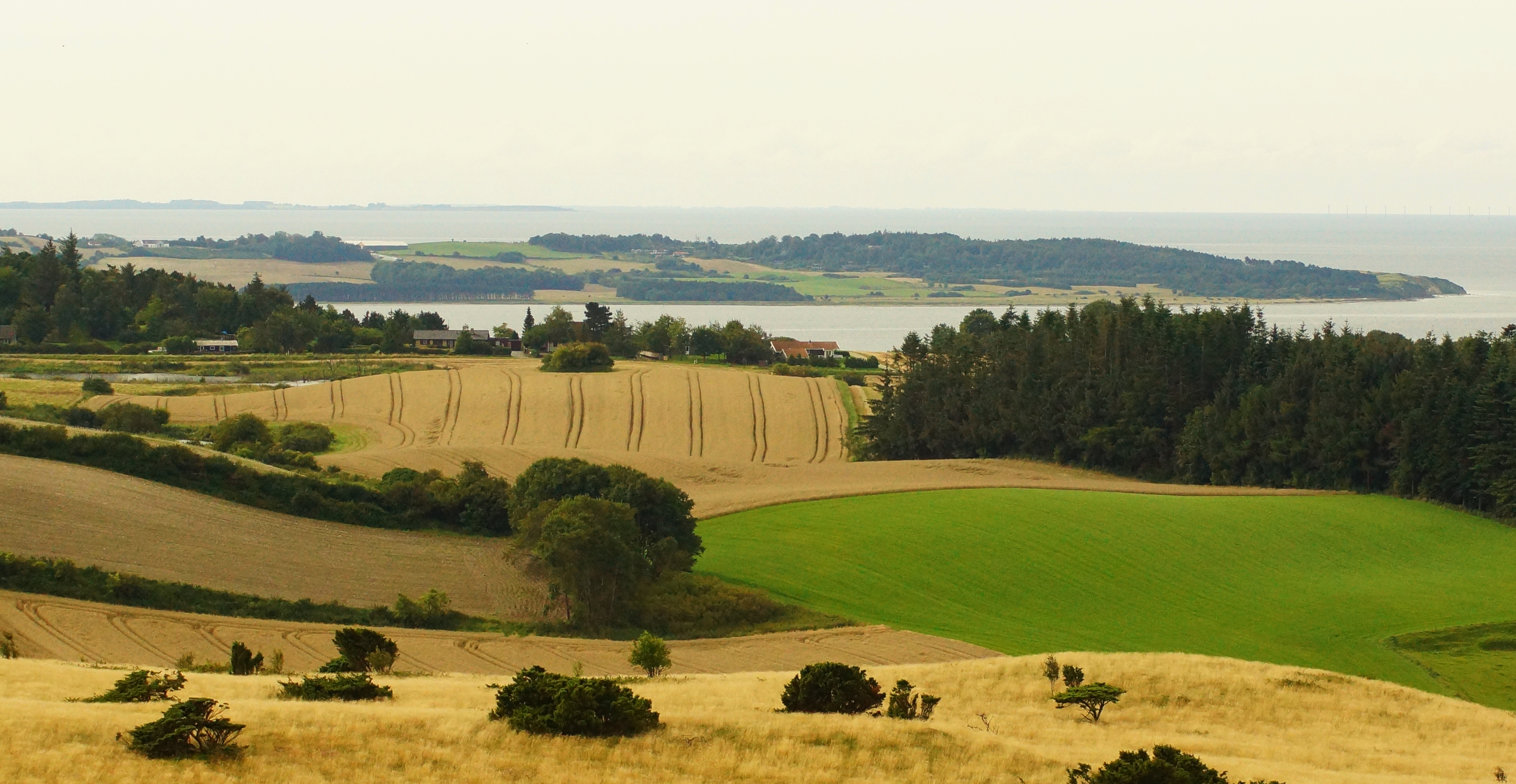 Begtrup Vig set fra Trehøje, sydlige Djursland.